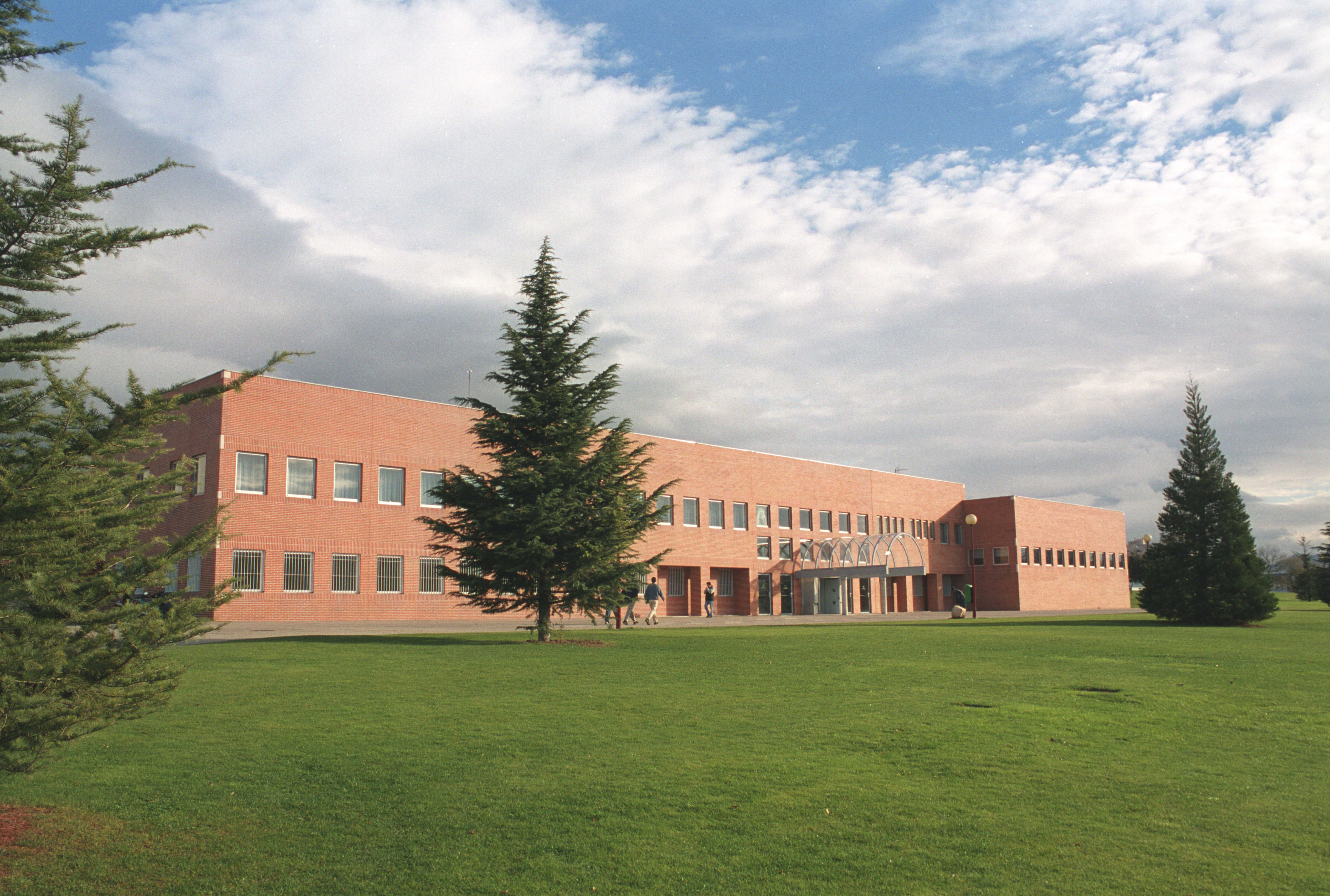 Vista exterior de la facultad.